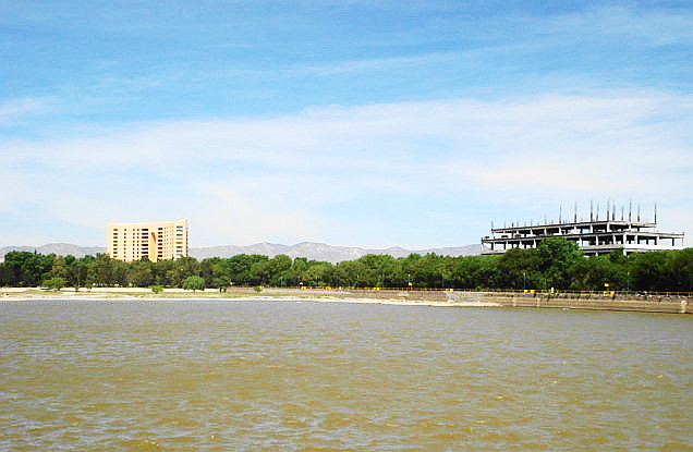 Lago Mayo en el Parque Tangamanga, San Luis Potosi, Mexico.